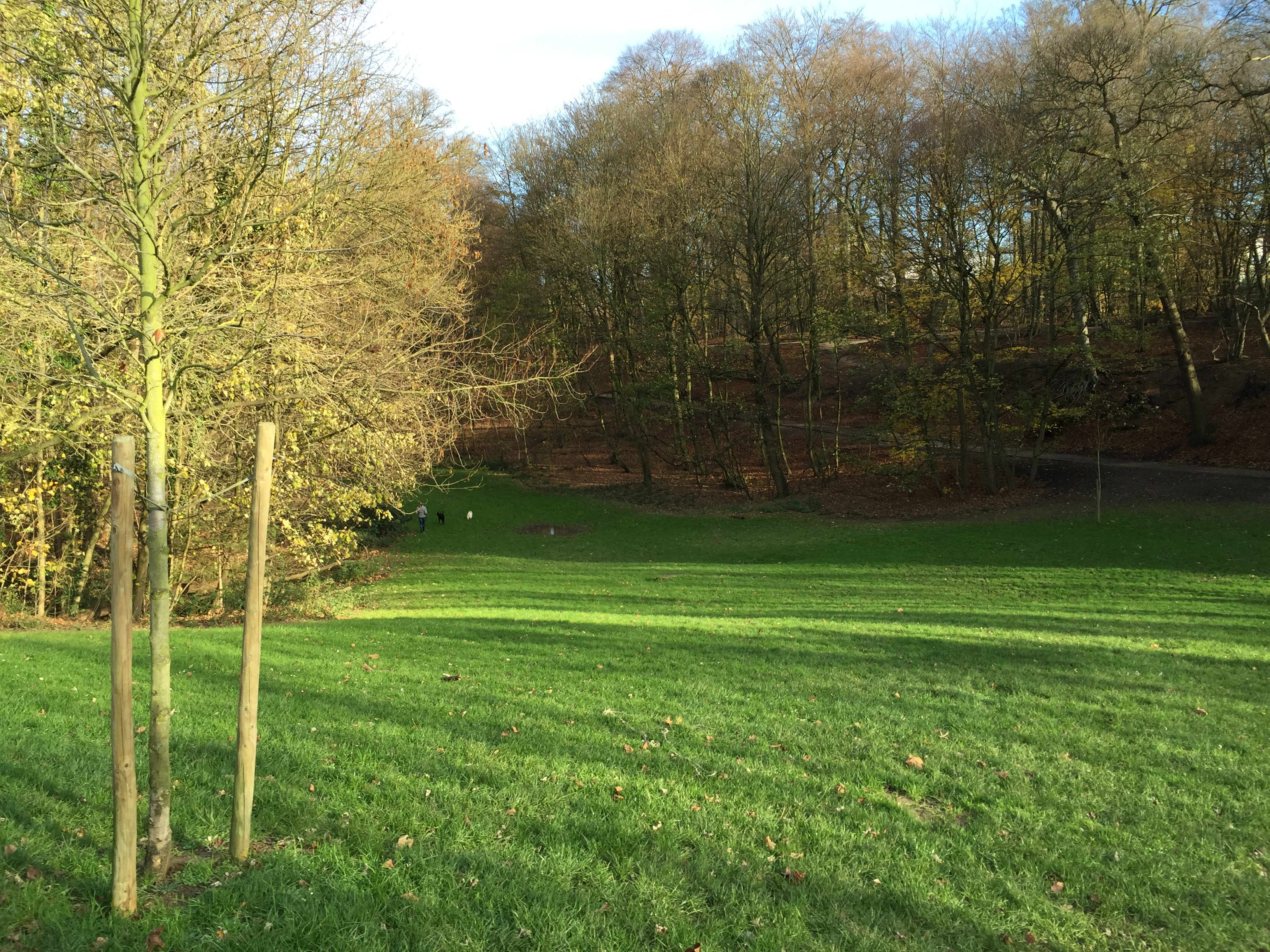 Parc Brugmann3